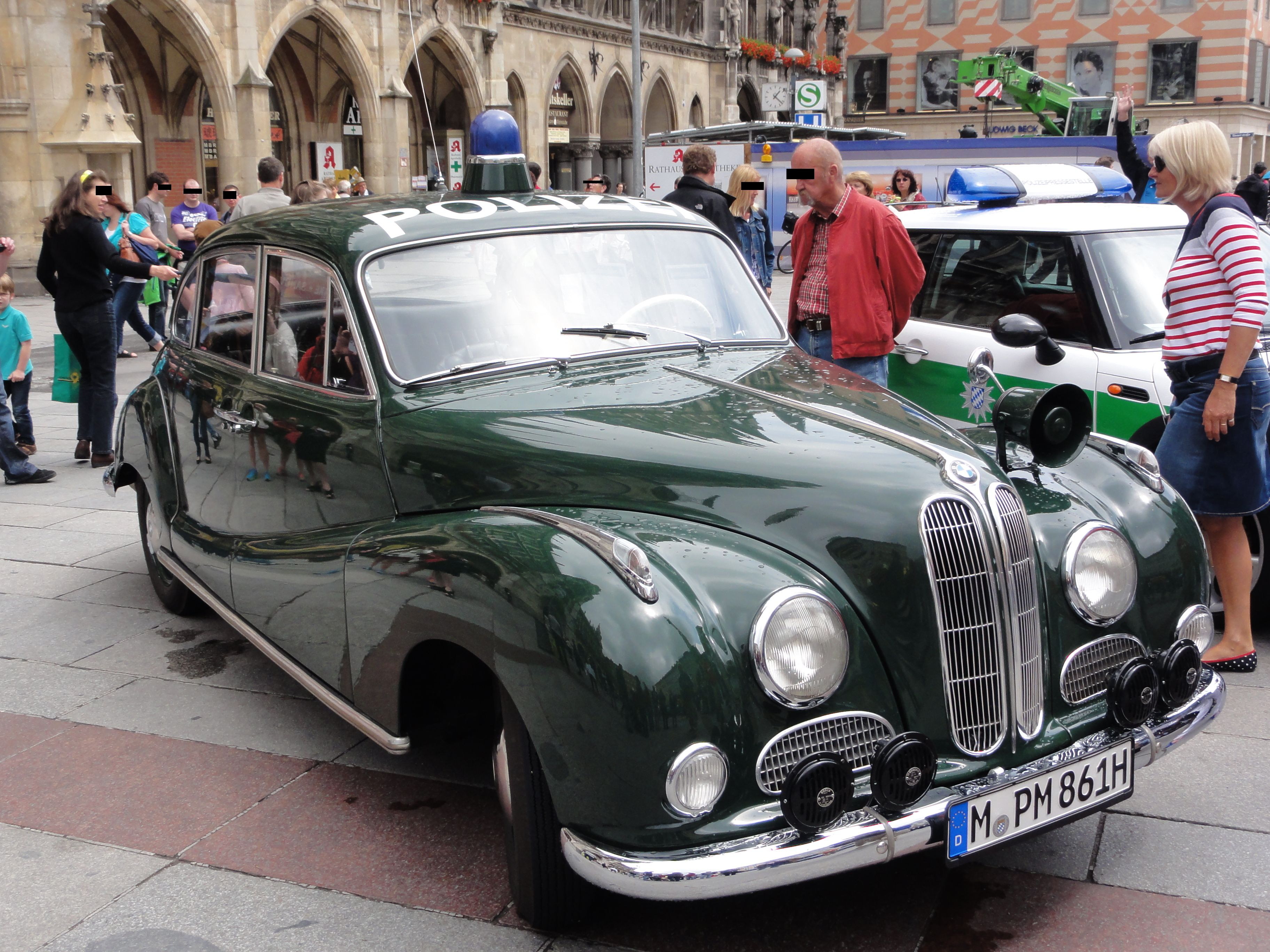 Munich